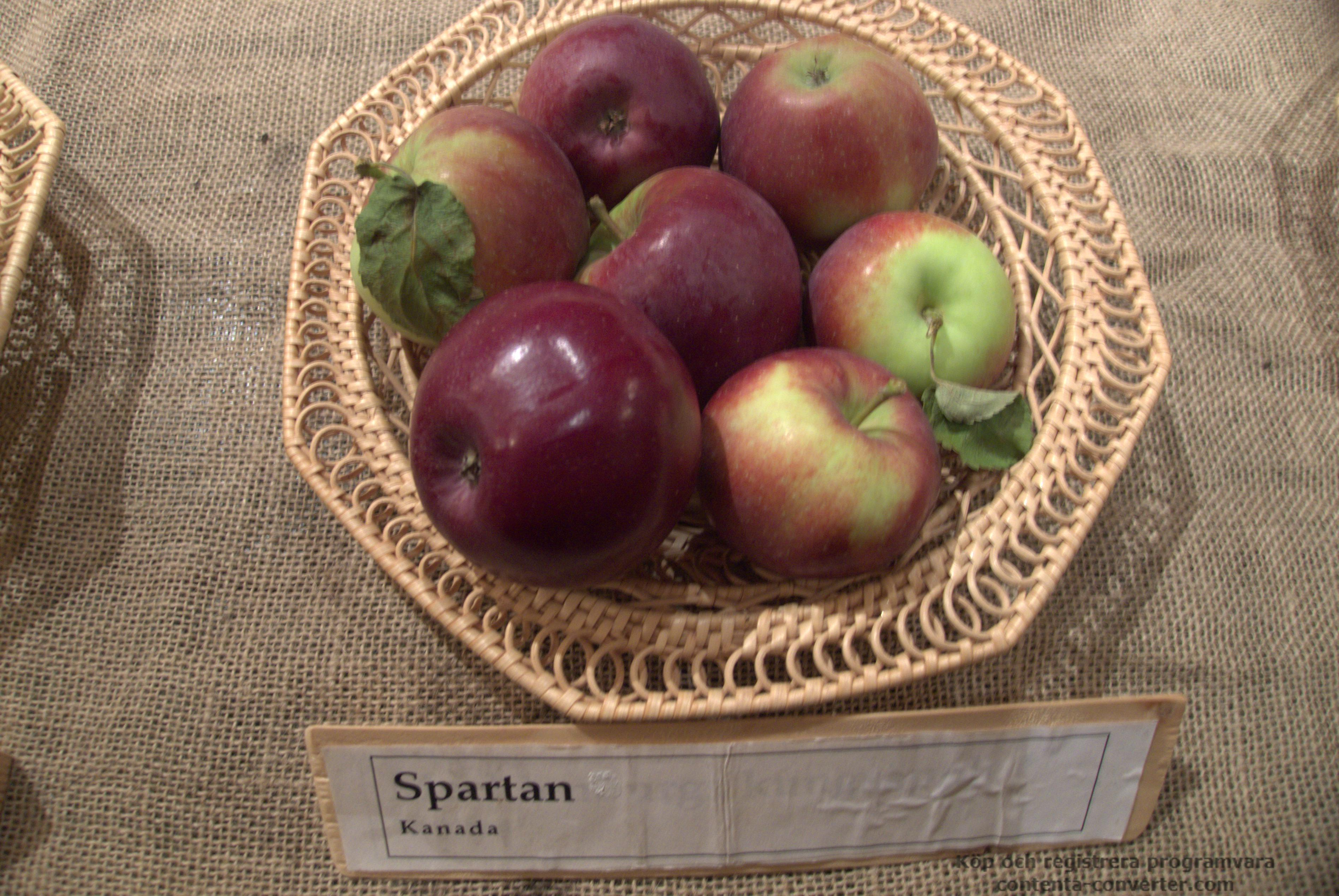 Äpplen av sorten Spartan